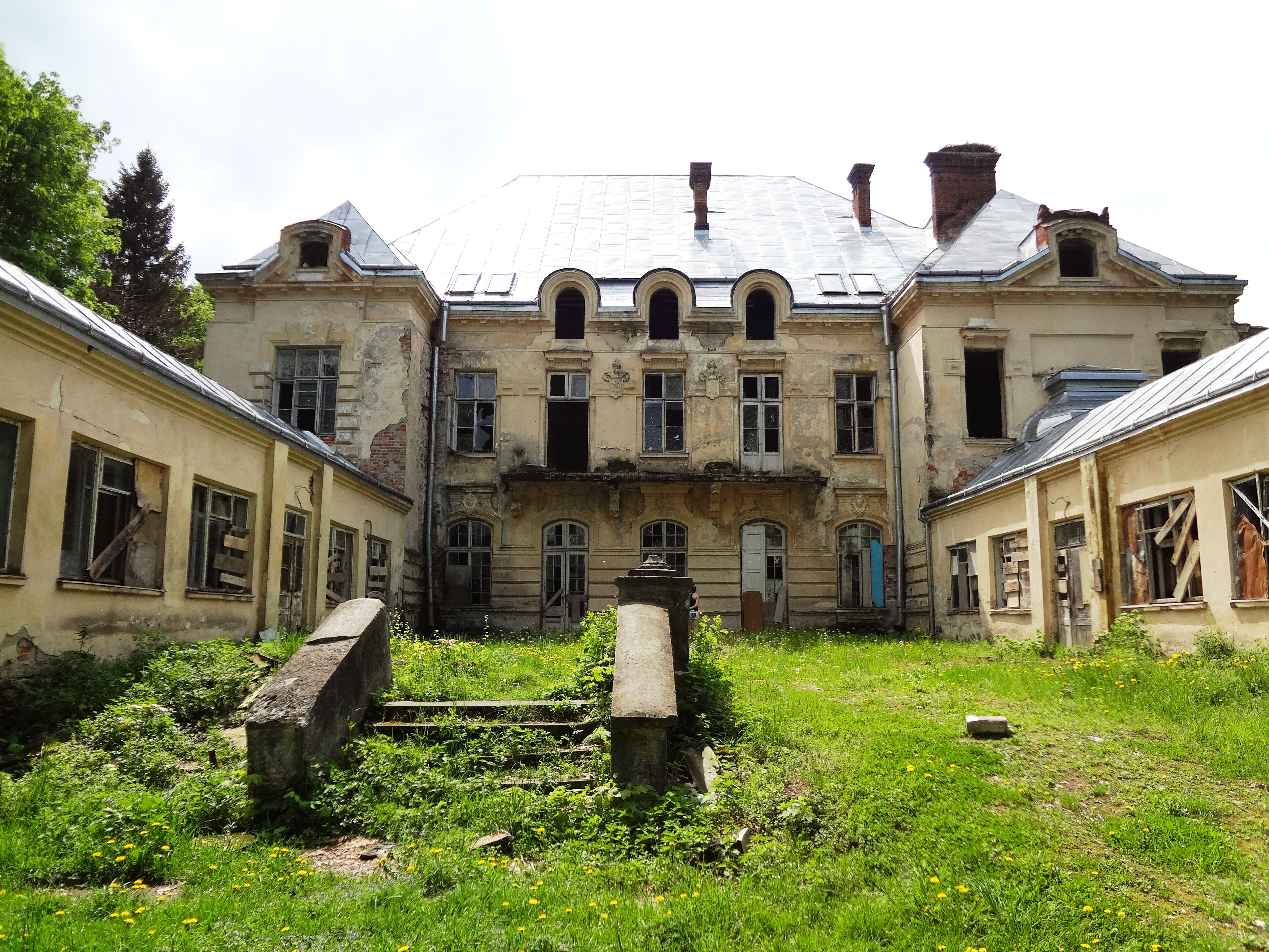 Палац Чарторийських (мур.), смт. Журавно